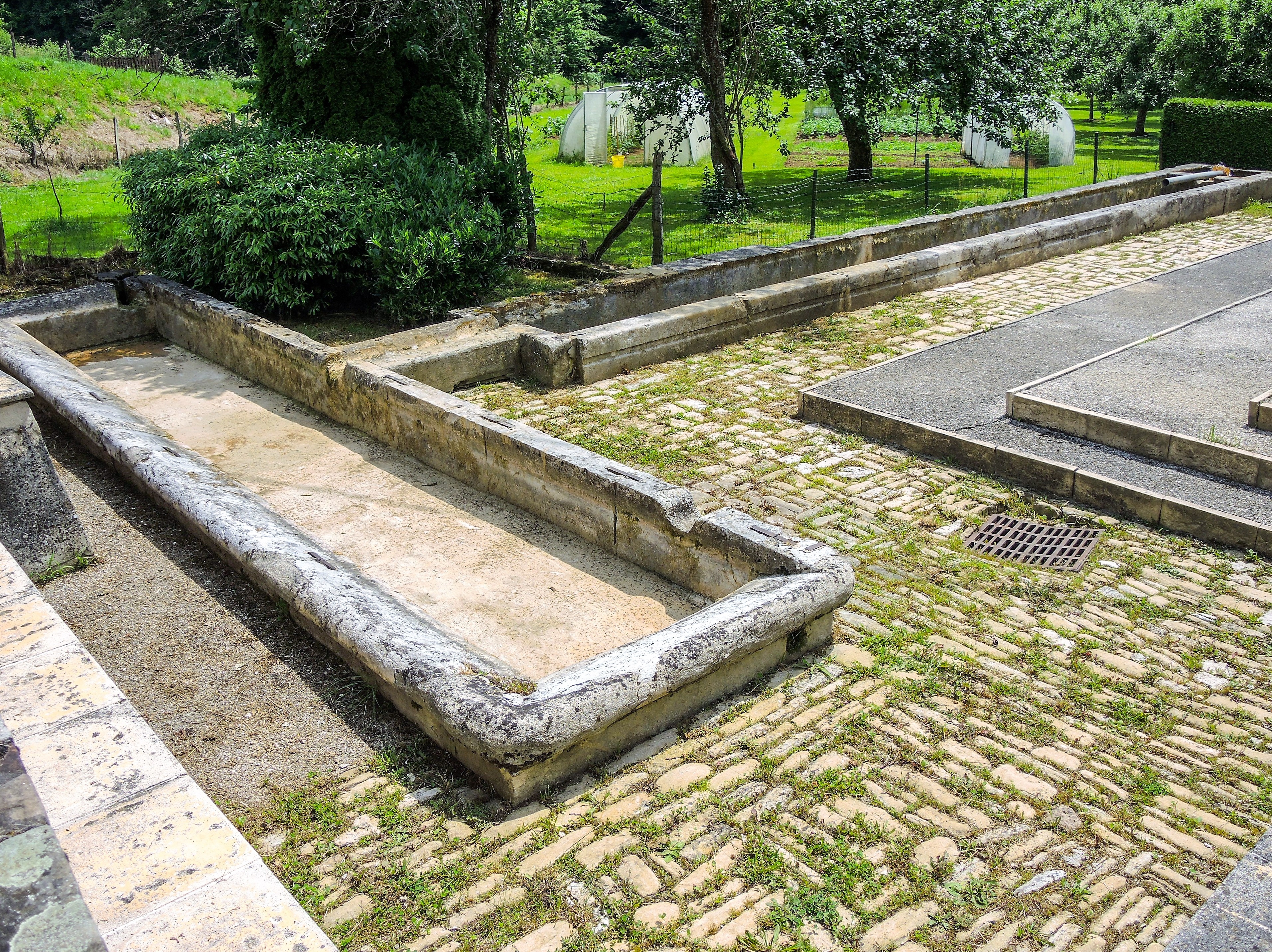 Fontaine-lavoir-abreuvoir, dans le bas du village de Raynans. Doubs